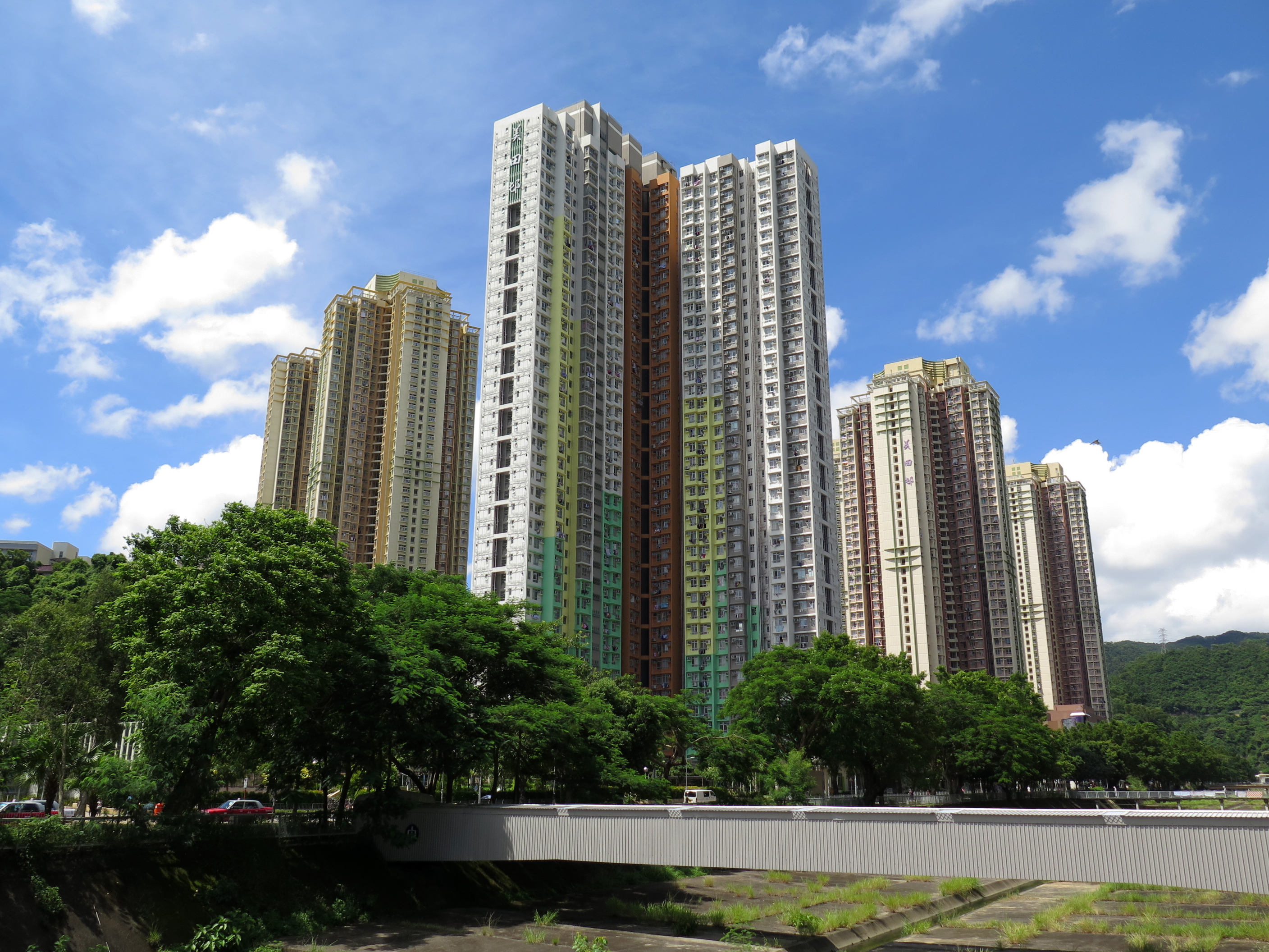 Mei Tin Estate